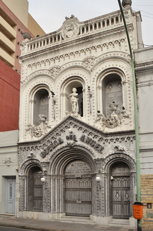 Es admirable la cantidad de detalles de ornamentación y el labrado arquitectónico y de las aberturas. La nubosidad de aquella mañana permite ver los detalles sin sombras duras. Gabriel Amato